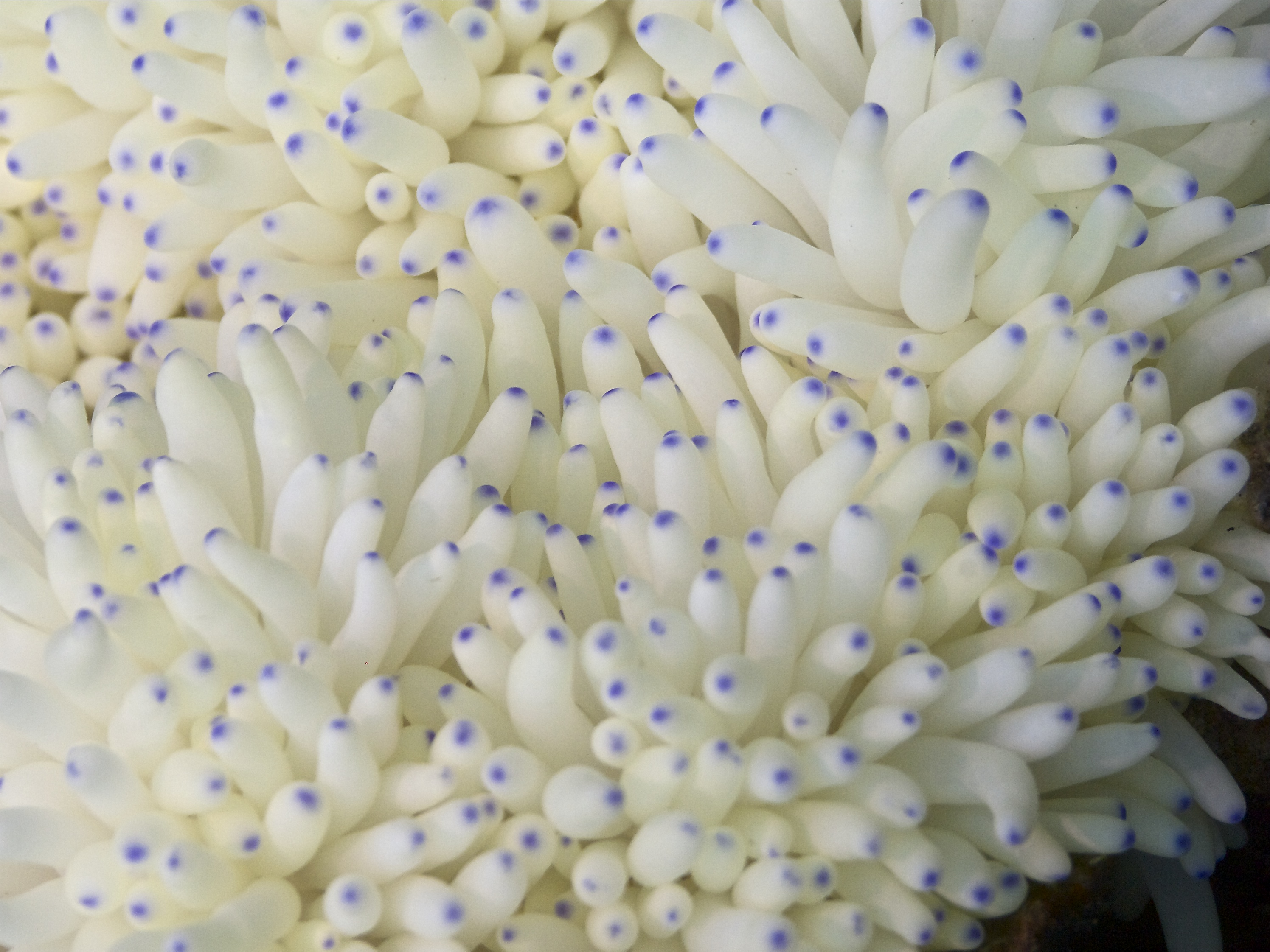 Squid Eggs, Philippines